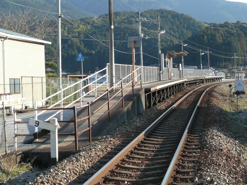 Erinono Station